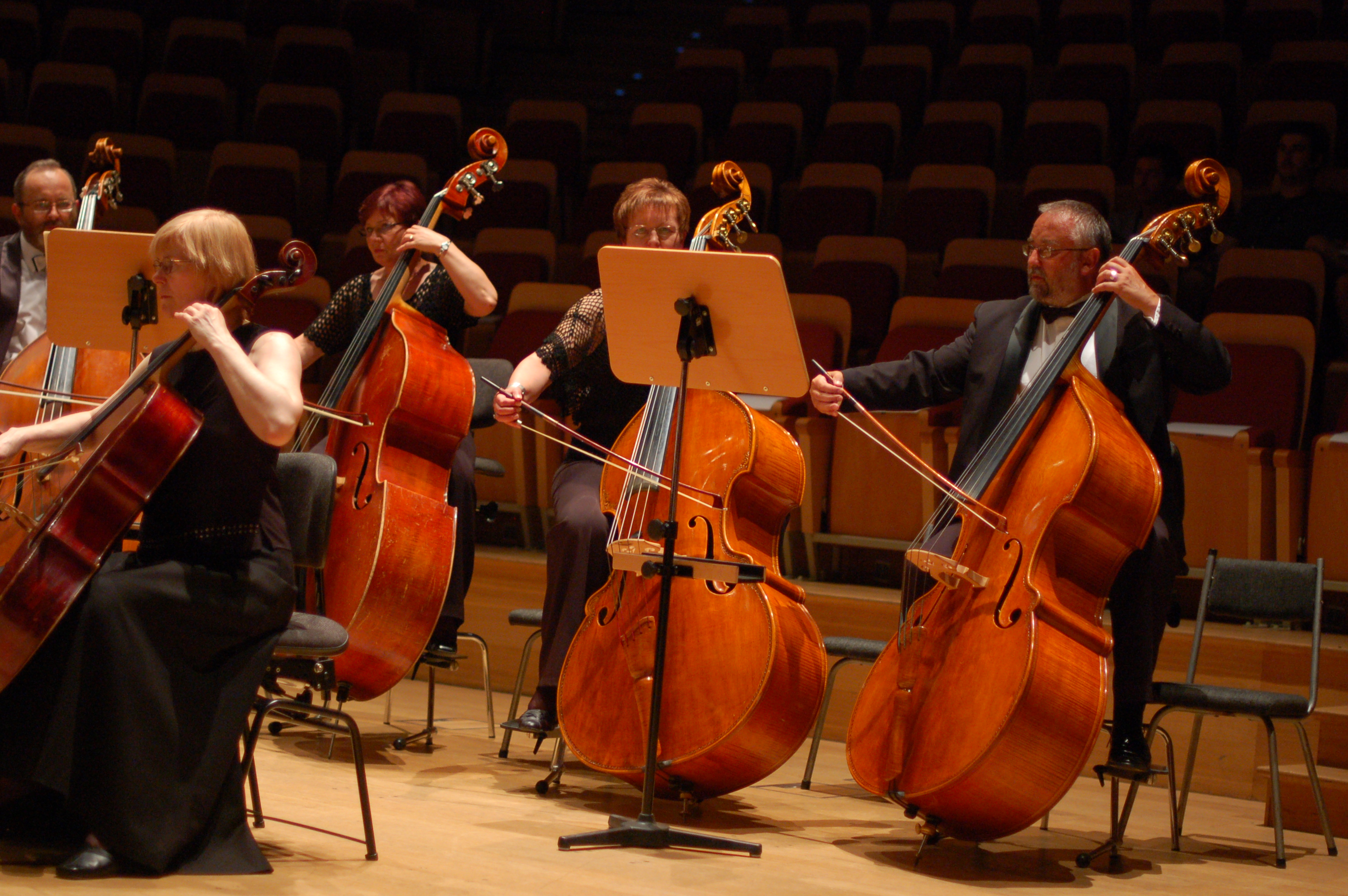 Wikimania Gdansk 2010